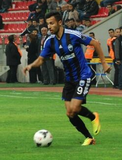 Yasin Öztekin Erciyesspor